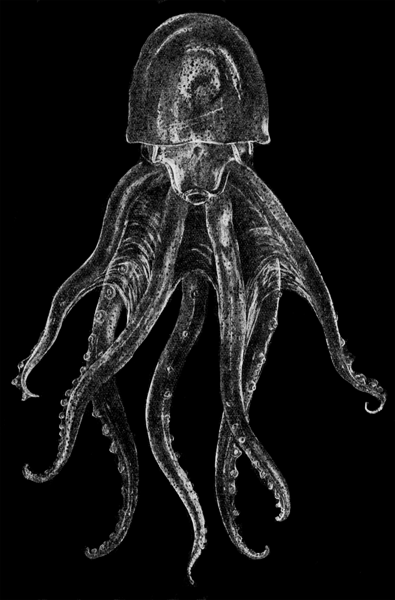 Vue de la face ventrale d'une femelle Vitreledonella richardi capturé à 5300 m de profondeur. Le 7eme bras a été arraché.